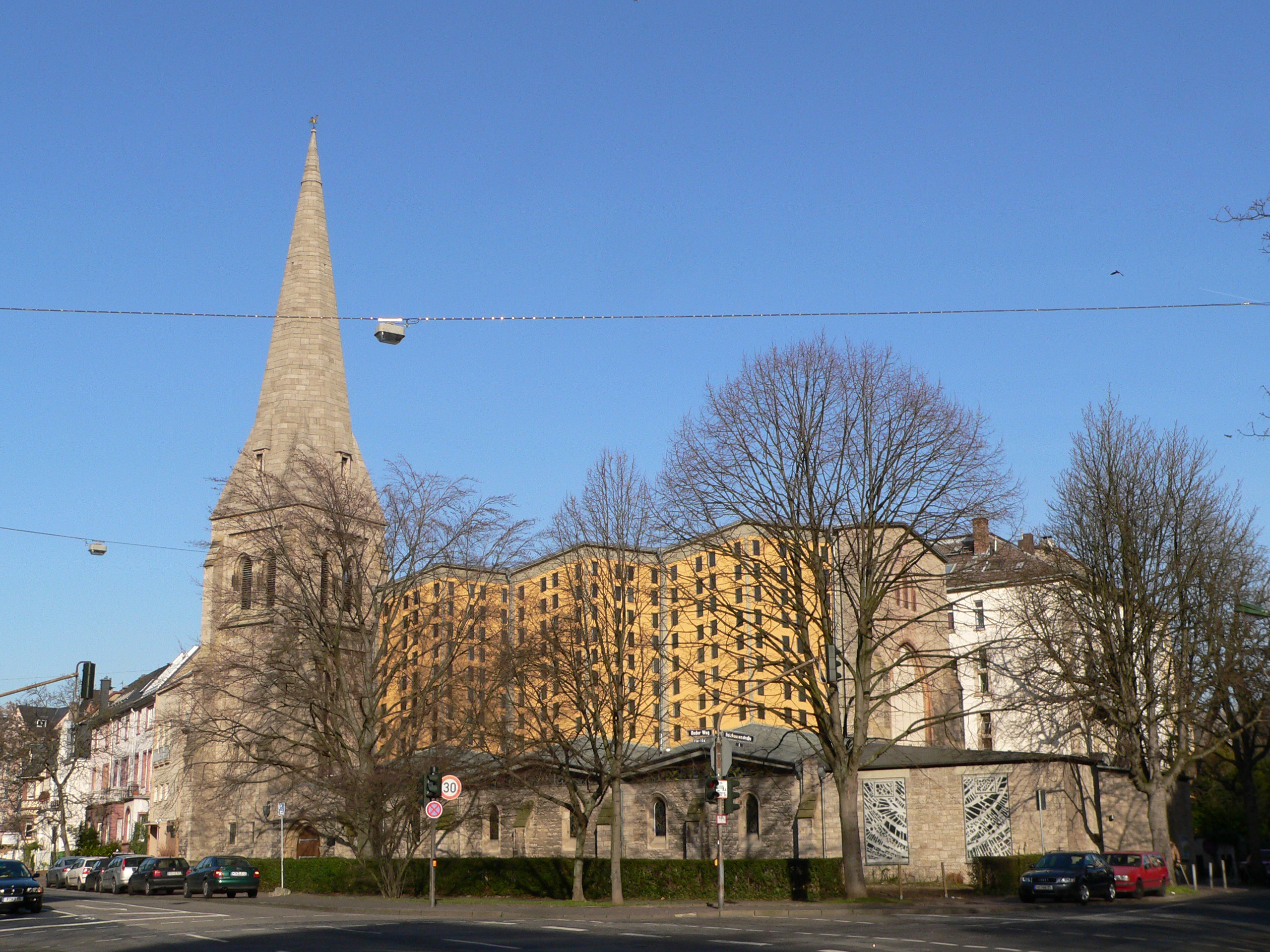 Oeder Weg in Frankfurt am Main, Epiphaniaskirche, 1901 als Immanuelkirche erbaut